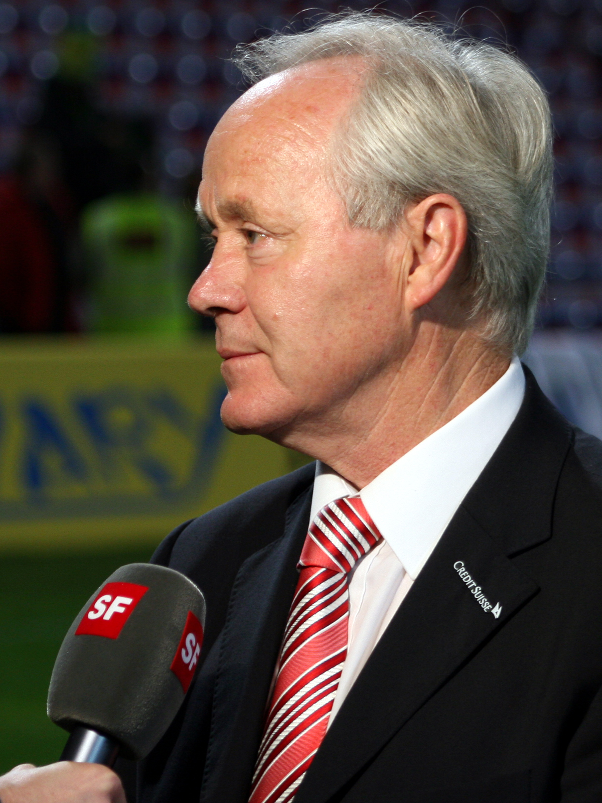 Köbi Kuhn, St. Jakob Stadion, Basel (Switzerland), Switzerland - Brasil 1:2